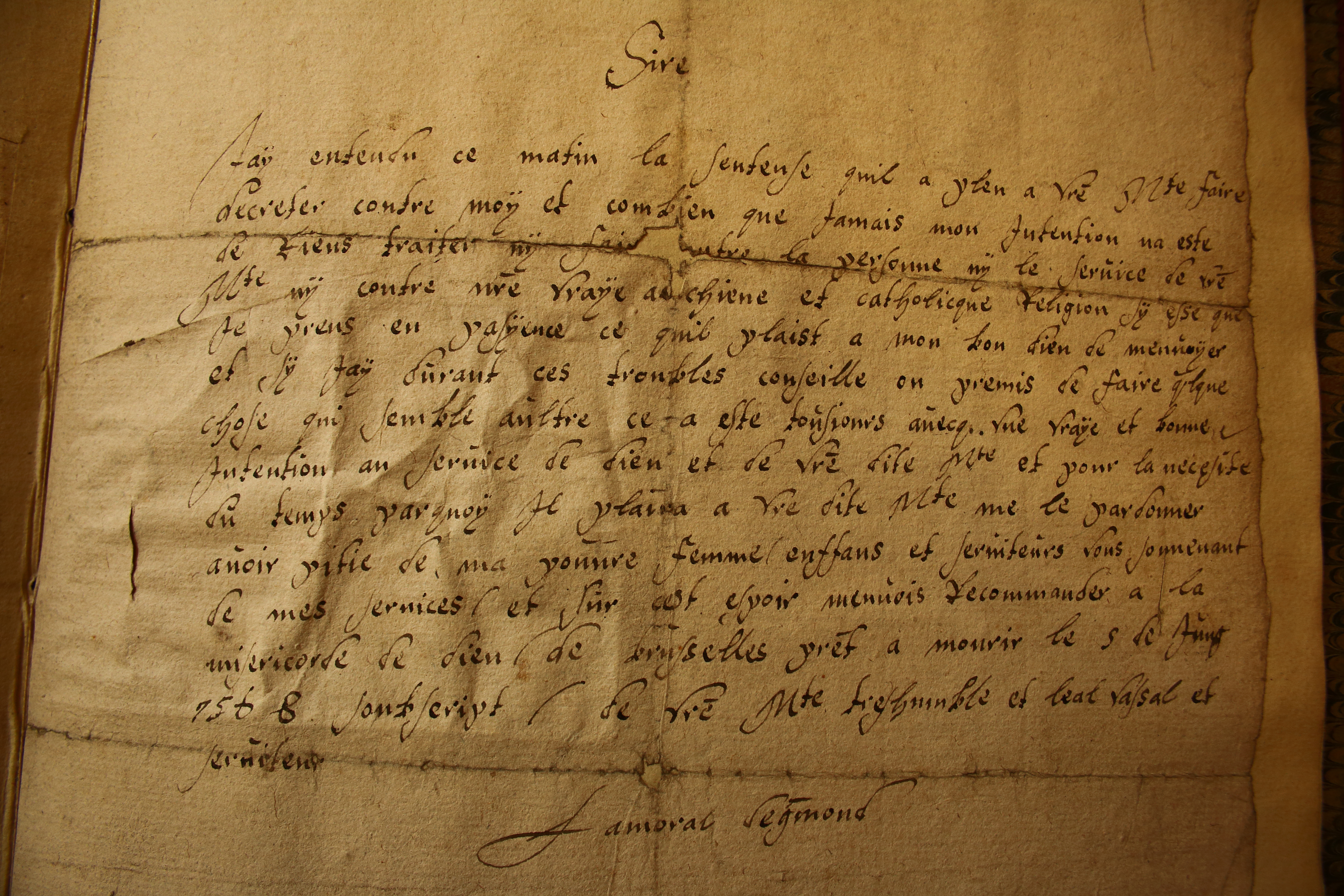 laatste brief Lamoraal van Egmont aan Filips II, 5 juni 1568 (universiteitsbibliotheek Gent) (deze exacte kopie werd enkele dagen later verstuurd naar de vrouwe van Ohain in Keulen, op de vlucht voor de vervolging) 'Sire, J'ay entendu ce matin la sentence qu'il a pleu à Vostre Majesté de faire décréter contre moy, et combien que jamais mon intention n'ait esté de riens traicter ni faire contre la personne de Vostre Majesté, ni contre nostre vraye, ancienne et catholique religion, si est-ce que je prends en patience ce qu'il plaist à mon bon Dieu de m'envoyer. Et si j'ay, durant ces troubles, conseillé ou permis de faire quelque chose, que semble autre, n'a esté toujours que avecq une vraye et bonne intention au service de Dieu et de Vostre Majesté, et pour la nécessité du temps; parquoy, je prie à Vostre Majesté de me le pardonner, et avoir pitié de ma pauvre femme, enfans et serviteurs, vous souvenant de mes services passez. Et sur cest espoir je m'envois recommander à la miséricorde de Dieu. De Bruxelles, prest à mourir, le 5 de juing 1568. De Vostre Majesté tres humble et léal vassal et serviteur, Lamoral Degmont.'